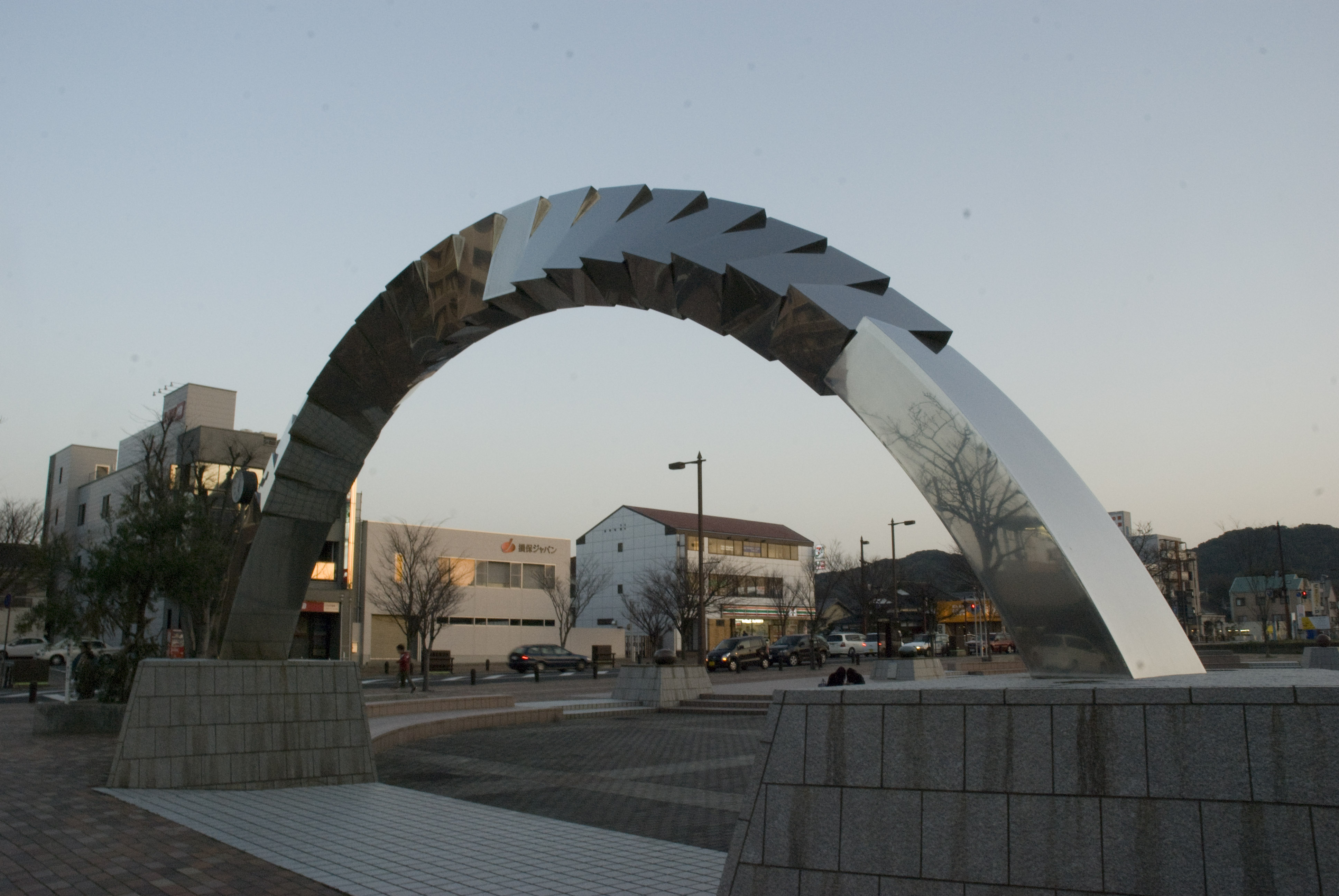 唐津市近代図書館前広場のオブジェクト